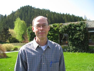 Foto di Craig Huneke